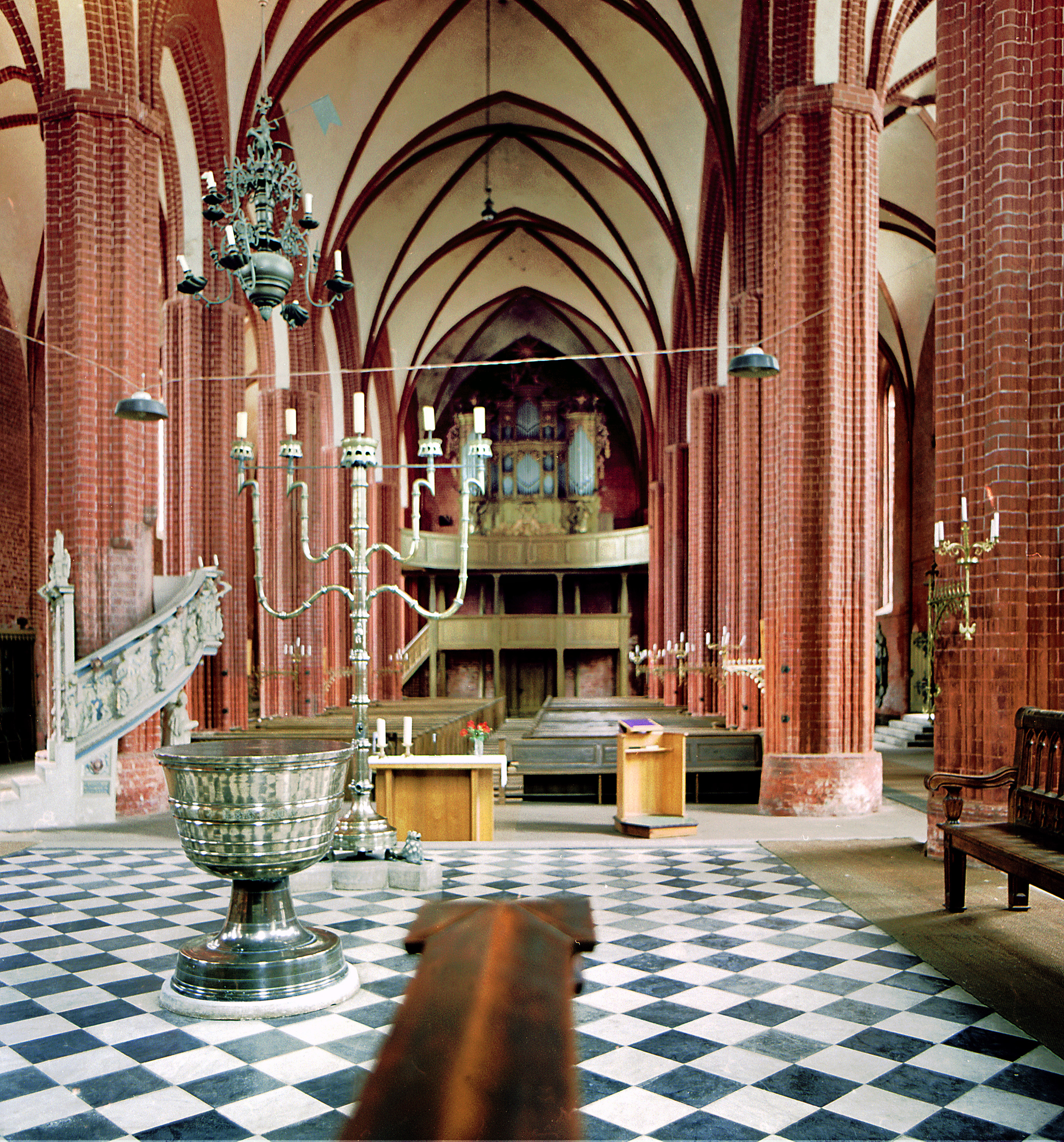 19.07.1986 3551 [39615] Werben (Elbe), Kirchplatz (GMP: 52.859728,11.981958): Pfarrkirche St. Johannis. Entstanden als 3-schiffige Halle ab dem 1. Viertel des 15. Jh; 2,9 m hoher Messingleuchter (1487); Messing Taufkessel (1489). [R19860719A10.TIF]19860719700NR.JPG(c)Blobelt